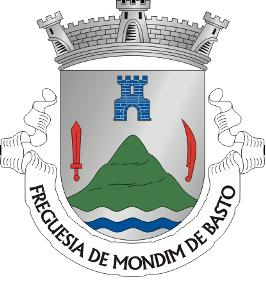 Brasão de Mondim de Basto